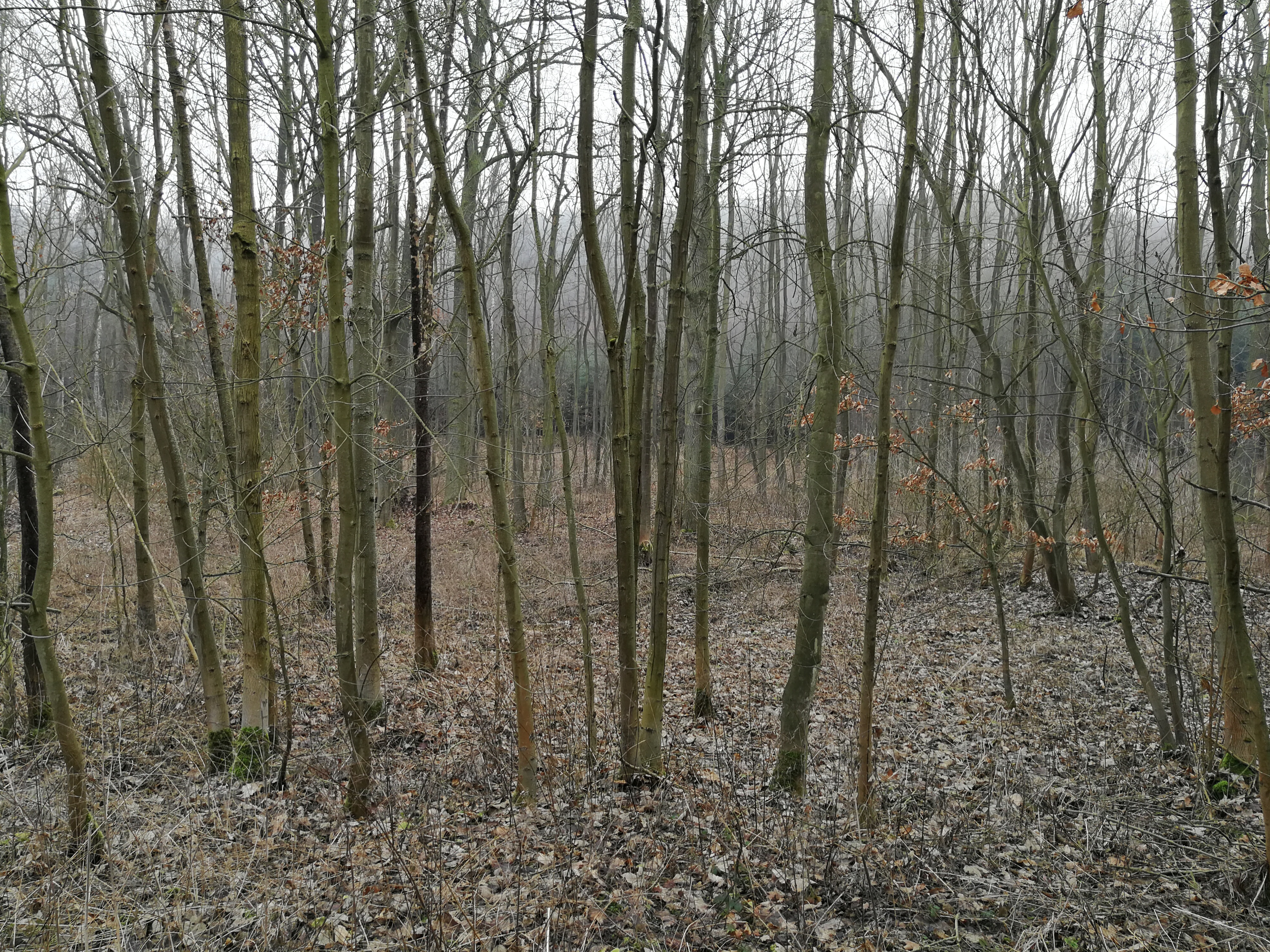 Červené dolíky. Okres Kladno, Česká republika.